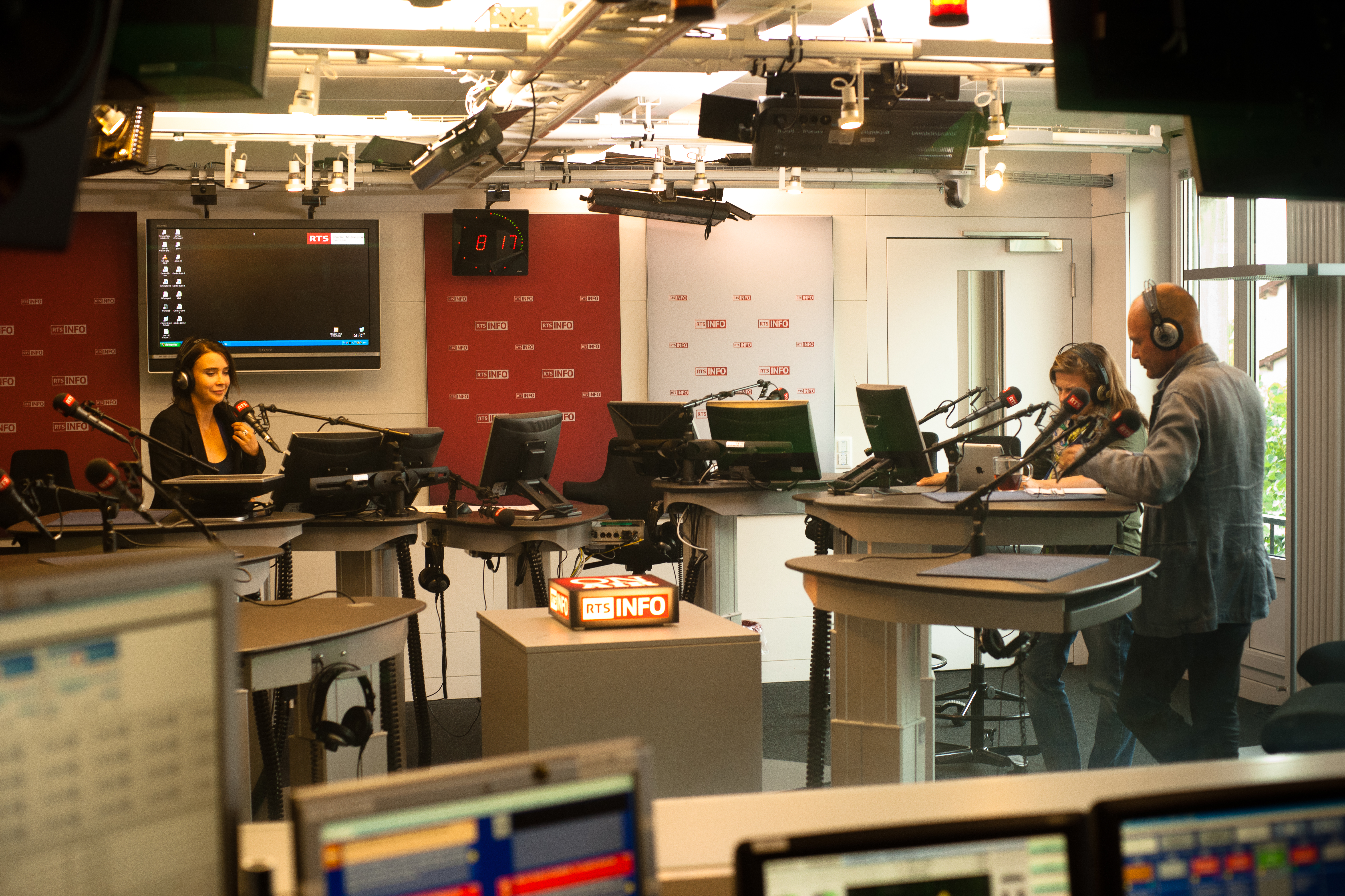 Emission En ligne directe de la Radio Télévision suisse, le 10 septembre 2012. Nathalie Ducommum à gauche, Magali Phlipp et Bertrand Piccard sur la droite.